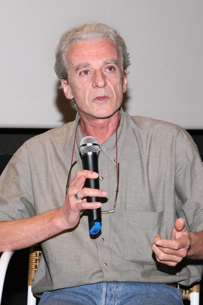 O cineasta Andréa Tonacci, diretor do filme Serras da Desordem. Foto: Damião A. Francisco